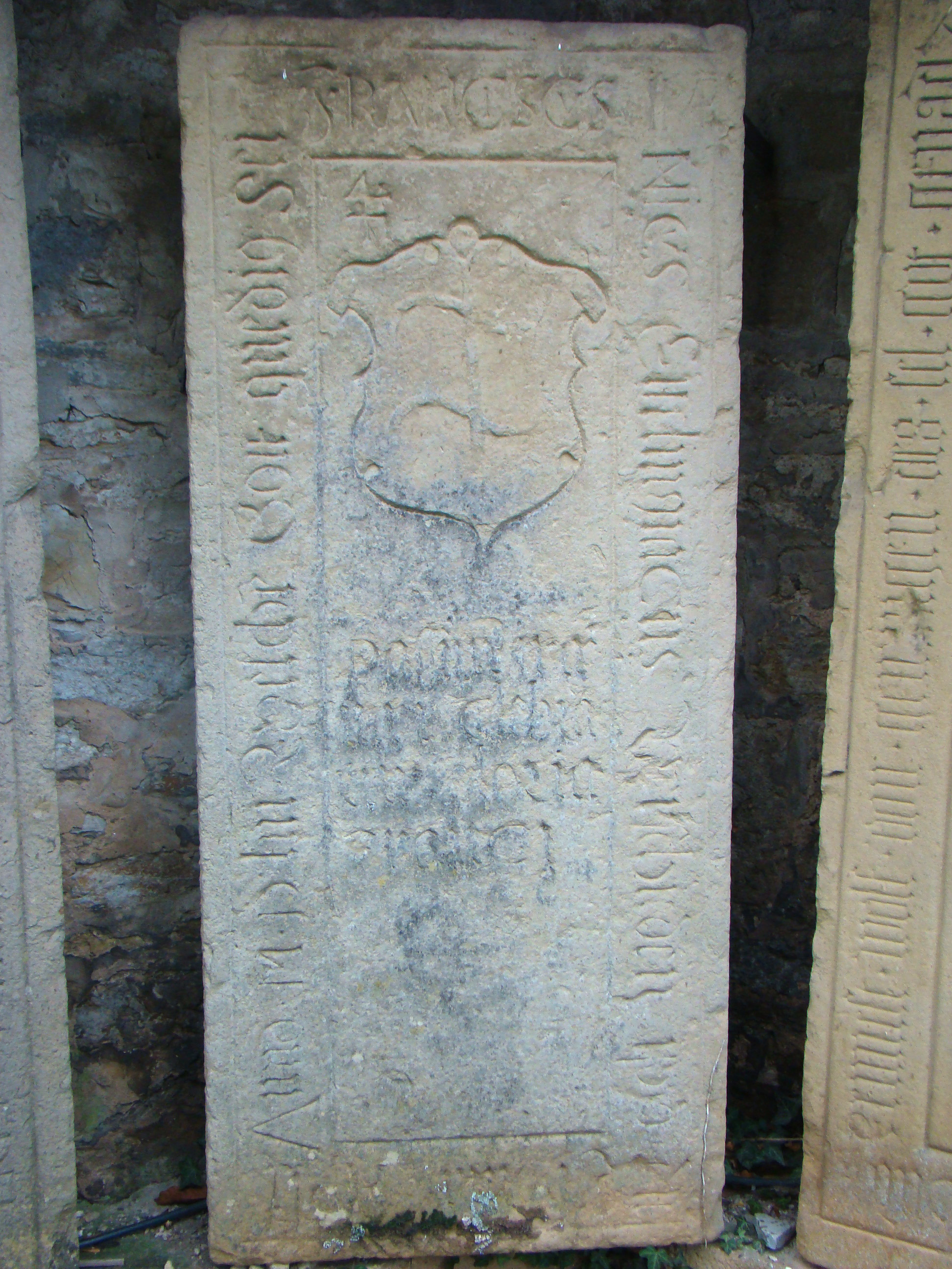 Historische Grabmale beim Unterschloss Gemmingen: Franciscus Irenicus († 1553), Prediger und Leiter der Lateinschule in Gemmingen